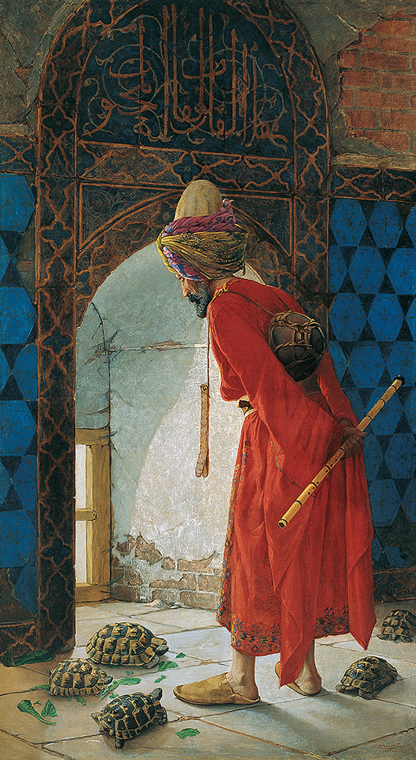 1906’nın 1 Mayıs günü Paris Grand Palais’de açılan, Fransız Sanatçılar Derneği’nin (Société des Artistes Français) düzenlediği Salon sergisinde Fransızca adı “L’homme aux Tortues” (Kaplumbağalı Adam), sergiye ait katalogların birindeyse ingilizce adı kısaca “Tortoises” (Kaplumbağalar) olarak verilen resim Osman Hamdi Bey’in “Kaplumbağa Terbiyecisi” olarak tanınmış olan eseridir. Resmin üzerinde yer alan 1906 tarihi, Mayıs ayındaki sergiye yetişebilmesi için yılın ilk aylarında tamamlanmış olması gerektiğini düşündürür. Sanatçı bir yıl sonra, ayrıntılarda bazı farklılıklar içerse de aynı kompozisyonu yansıtan daha küçük boyutlu bir resim daha yapmıştır. Bu ikinci versiyonda Osman Hamdi Bey’in dünürü Salih Münir Paşa’ya ithaf edildiğini gösteren bir yazı bulunur.